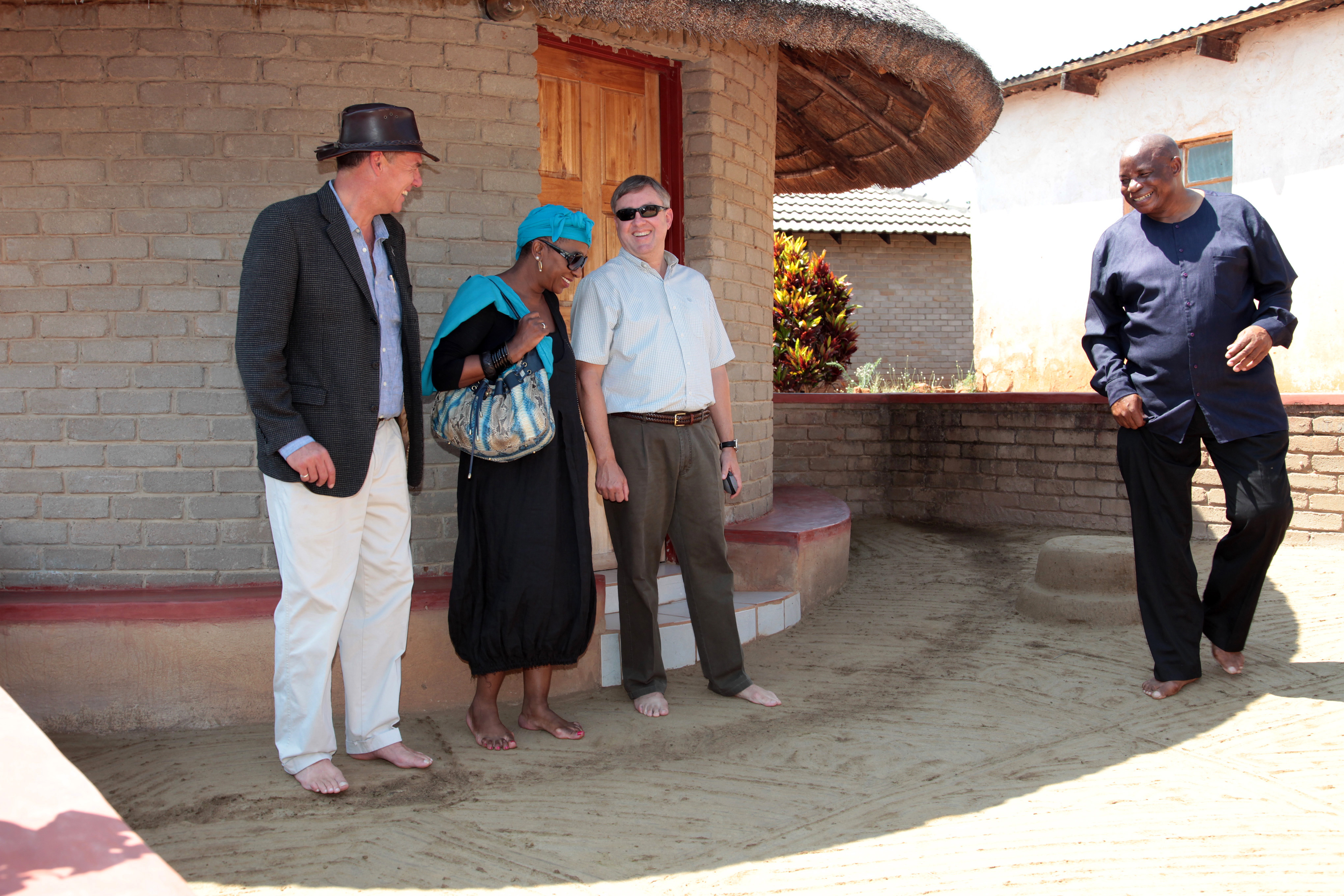 Vue du Limpopo en Afrique du Sud.